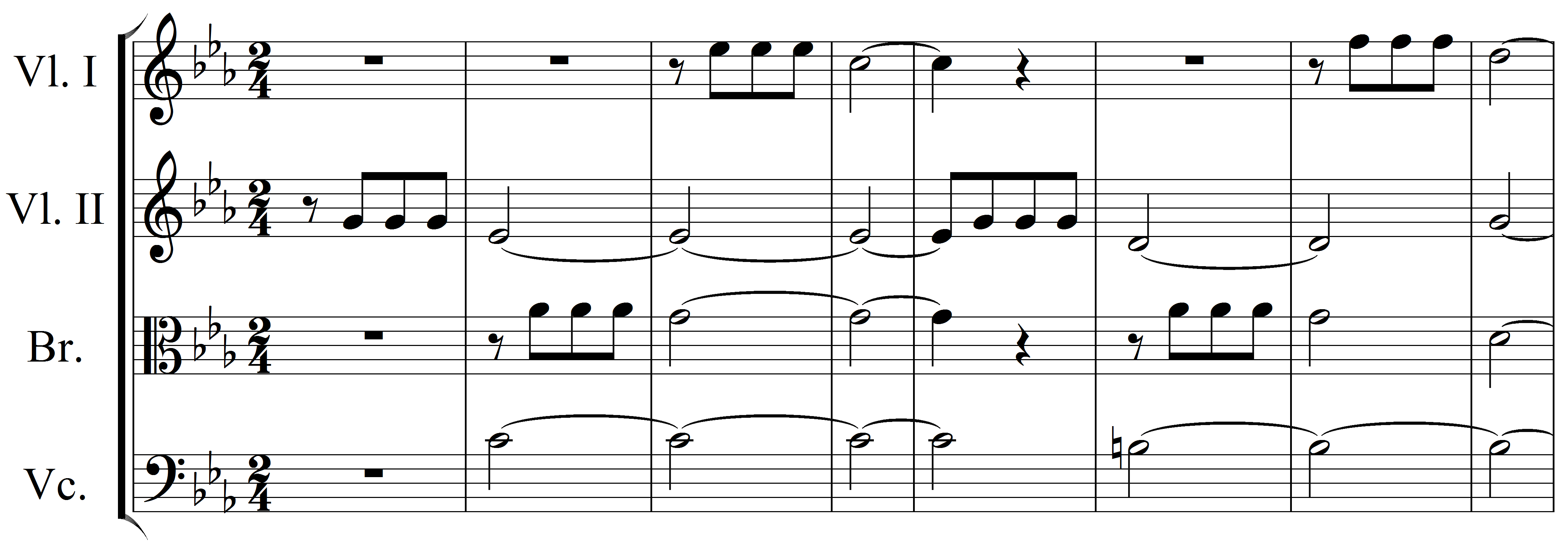 Erstes Thema der 5. Sinfonie von Beethoven